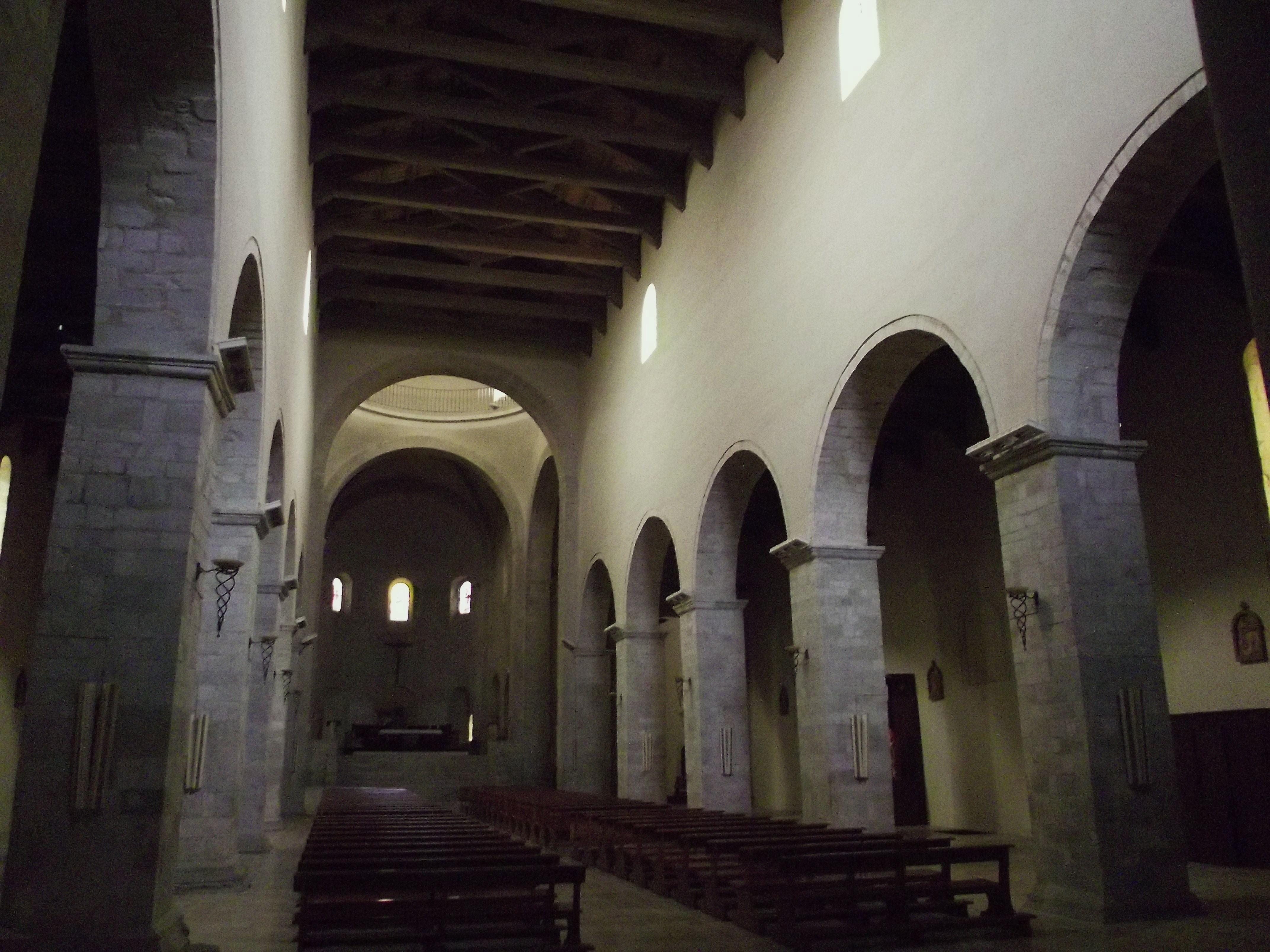 interno della Cattedrale